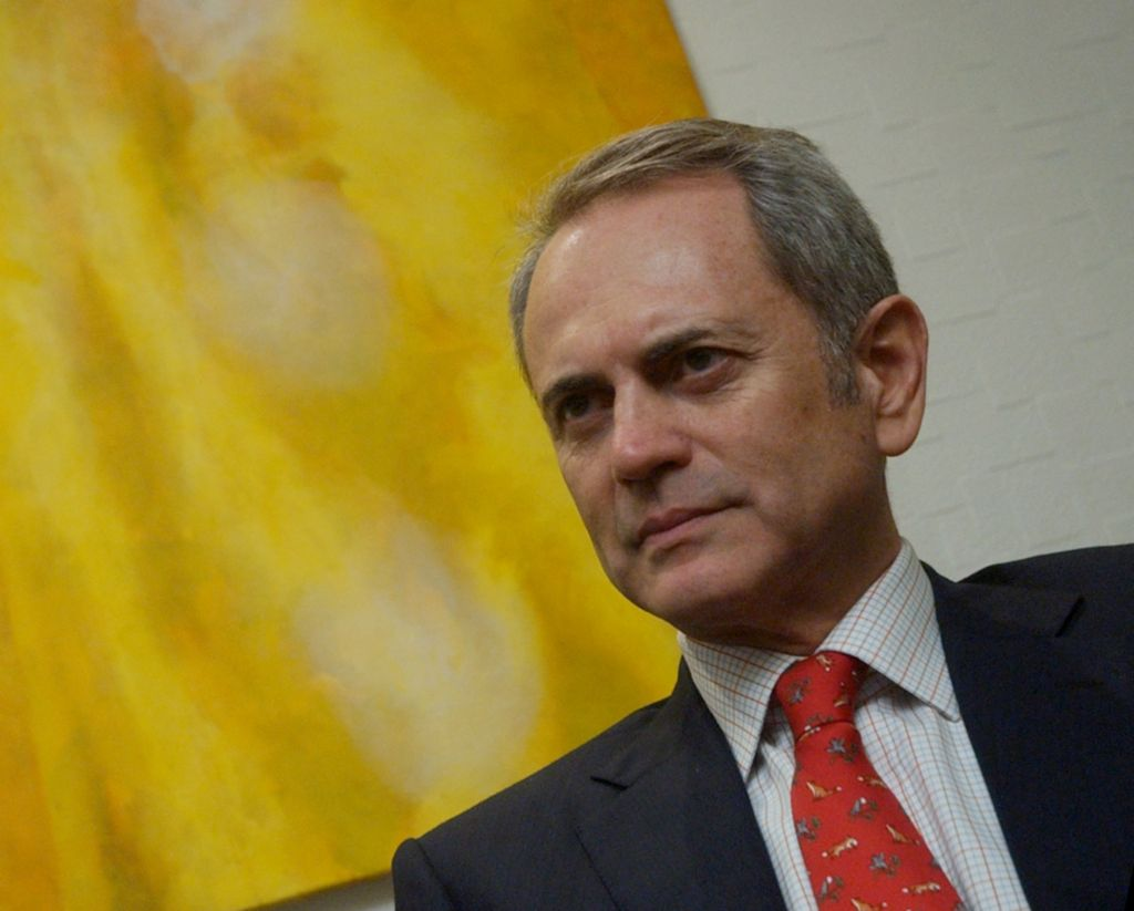 (portuguese) Paulo Octavio, vice-governador do Distrito Federal, Brasil - 2008